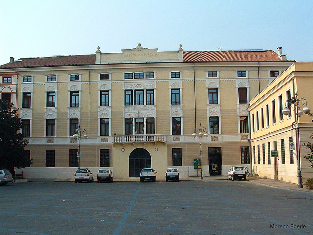 Palazzo Garbin lato piazza Statuto